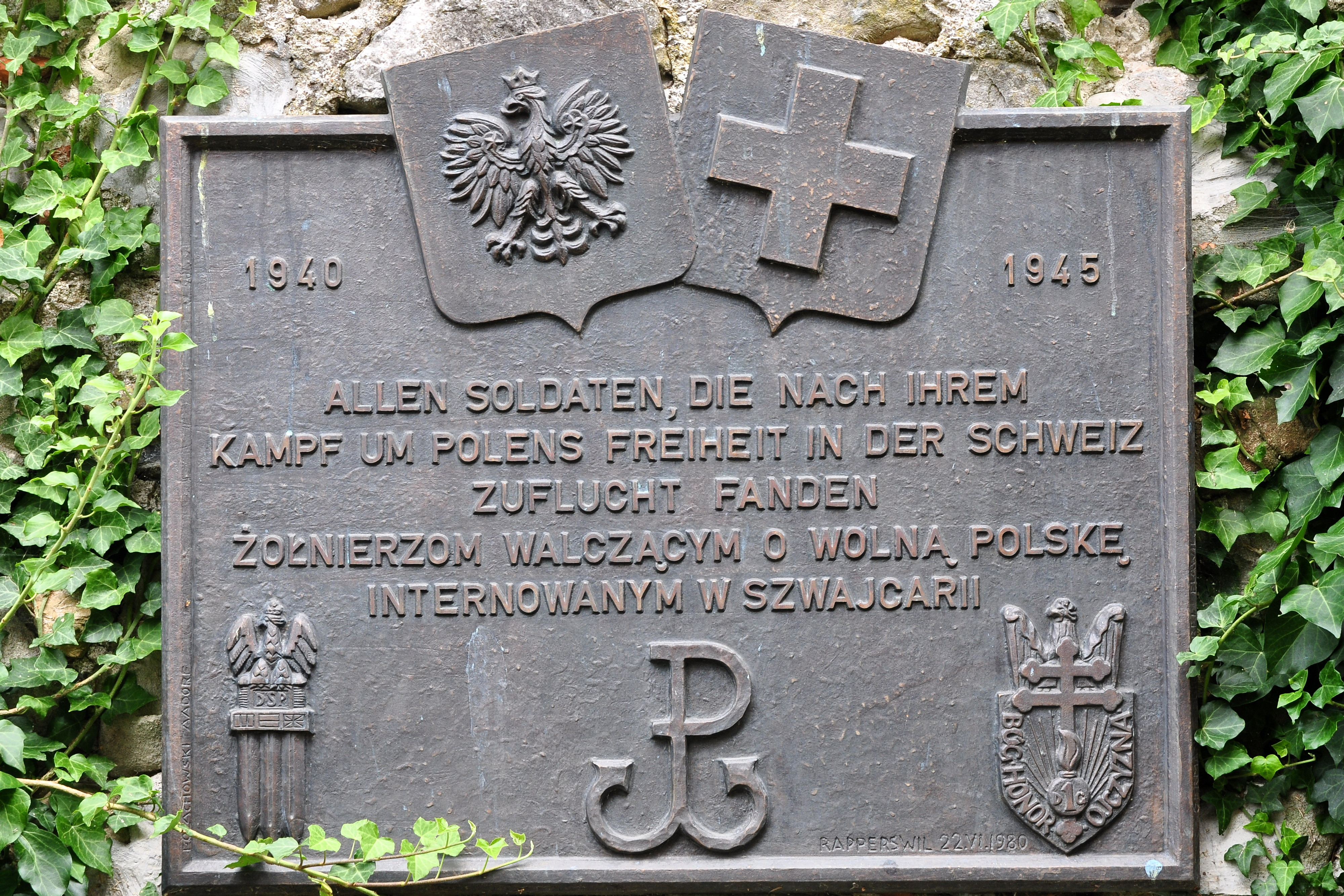 Kräutergarten und Polnisches Gartendenkmal (herbal garden and Polish garden memorial) at 'the' Schloss (castle) in Rapperswil (Switzerland)